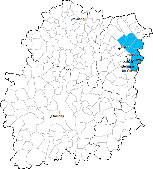 Carte de localisation du canton de Saint-Germain-lès-Corbeil en Essonne (91)